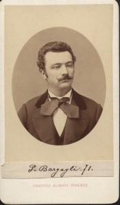 Pietro Bargagli (1844-1918) photo